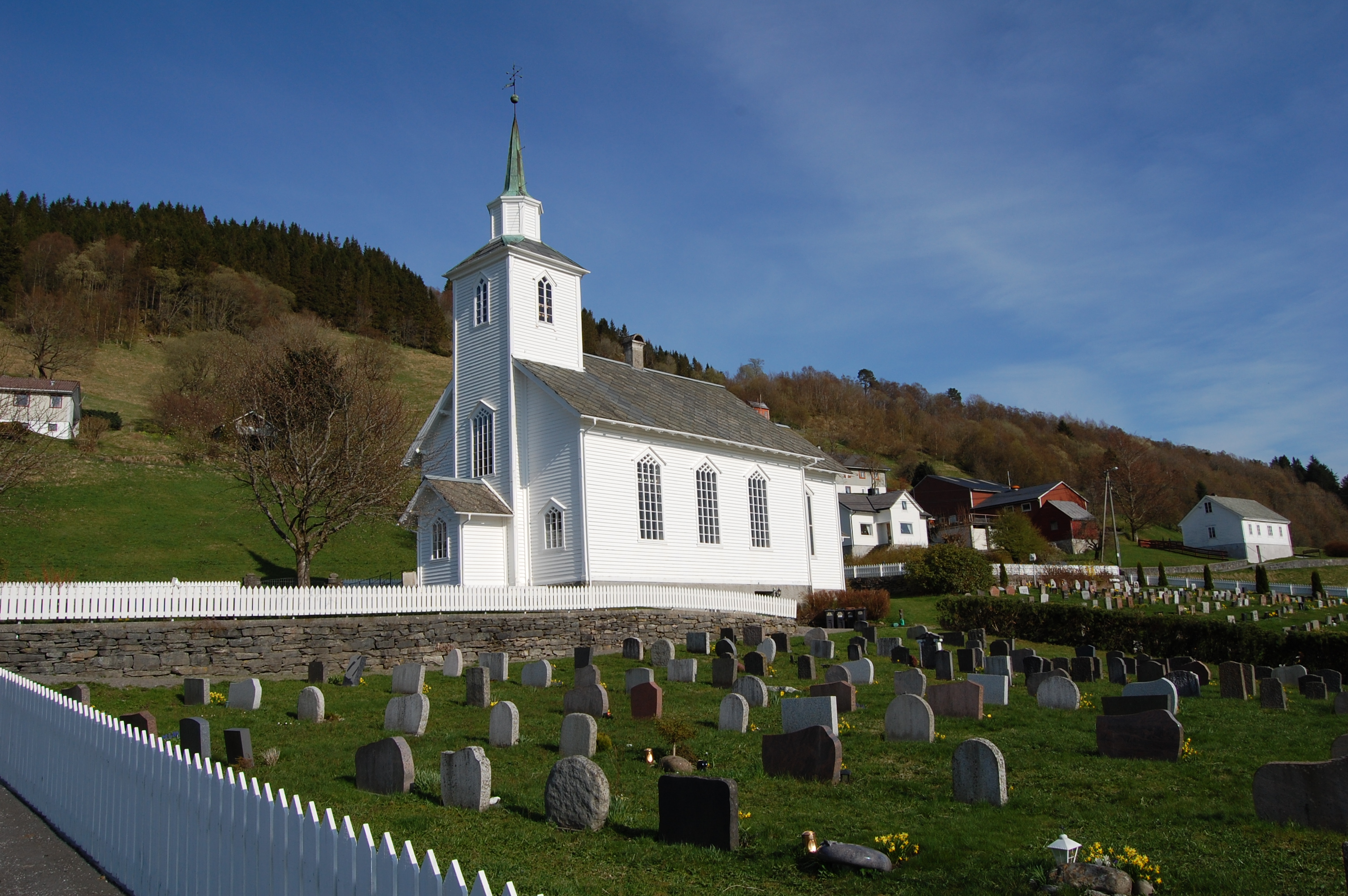 Seim kirke. Taken in Seim, Vestland fylke